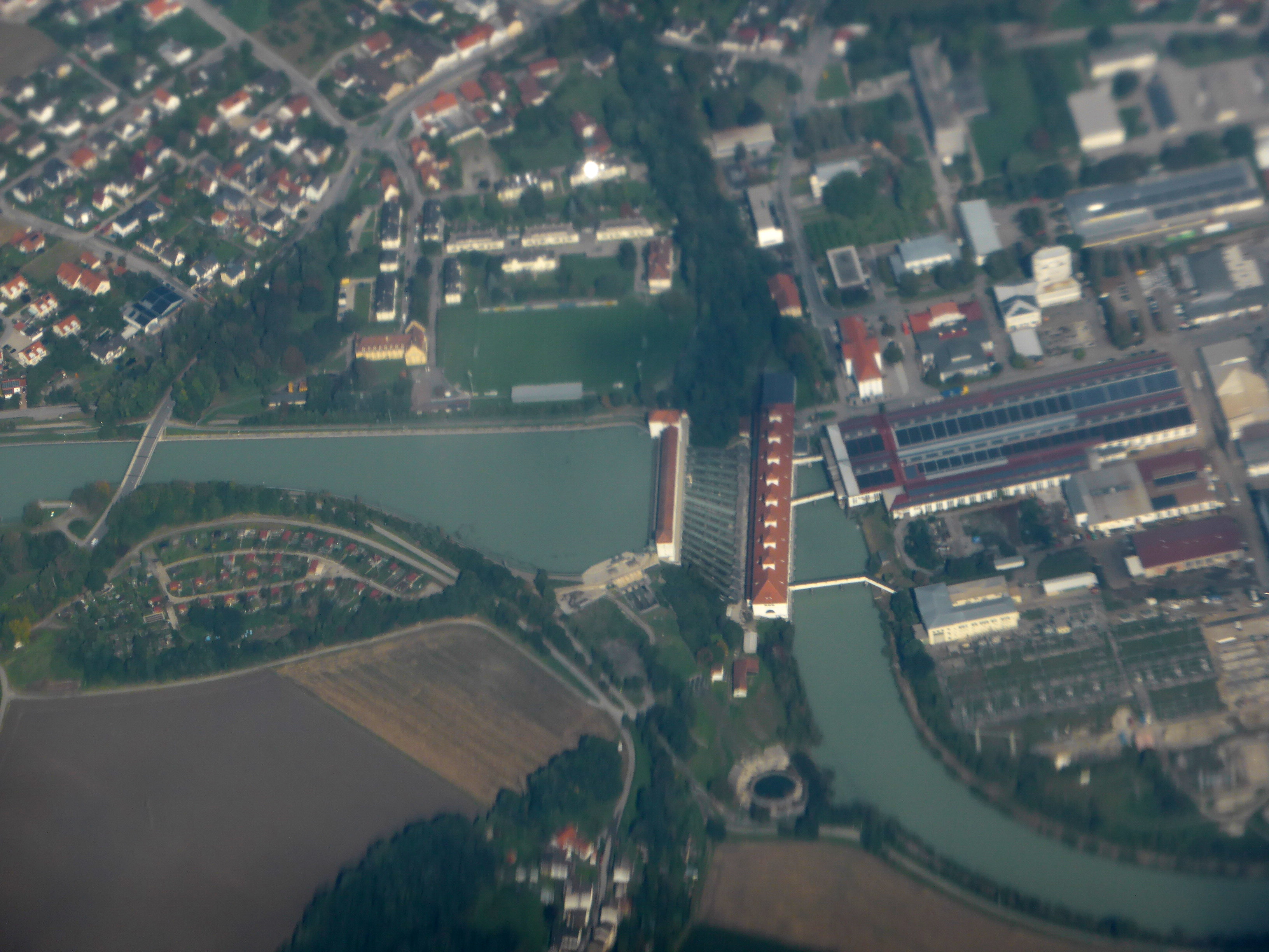 Das Innkanalkraftwerk in Töging.